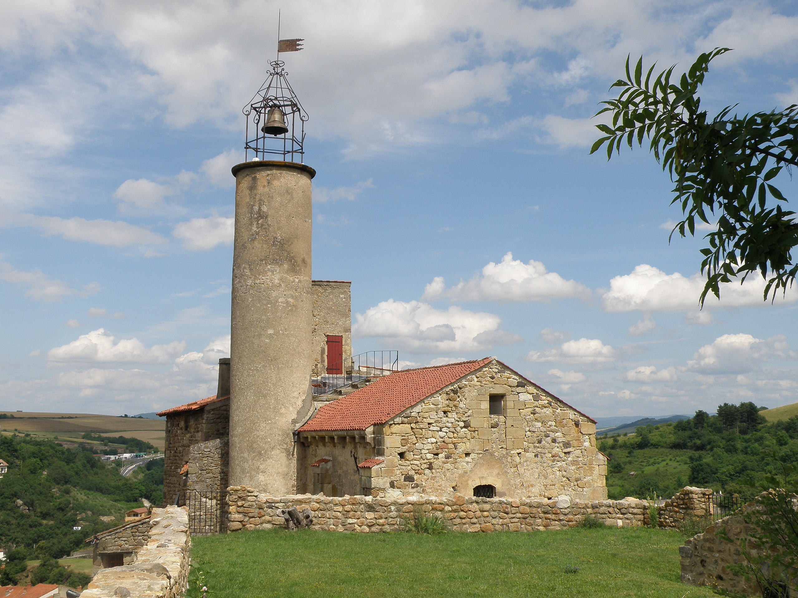 Champeix, comm. du Puy-de-Dôme (France, région Auvergne). Château du Marchidial, chapelle castrale Saint-Jean.